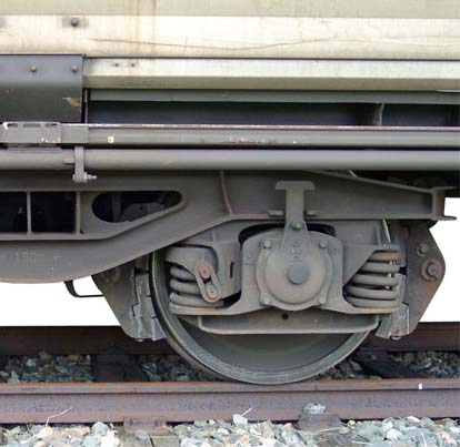 Rad mit Bremskloetzen Ausschnitt aus Bild:Drehgestell 01 KMJ.jpg von Benutzer:KMJ